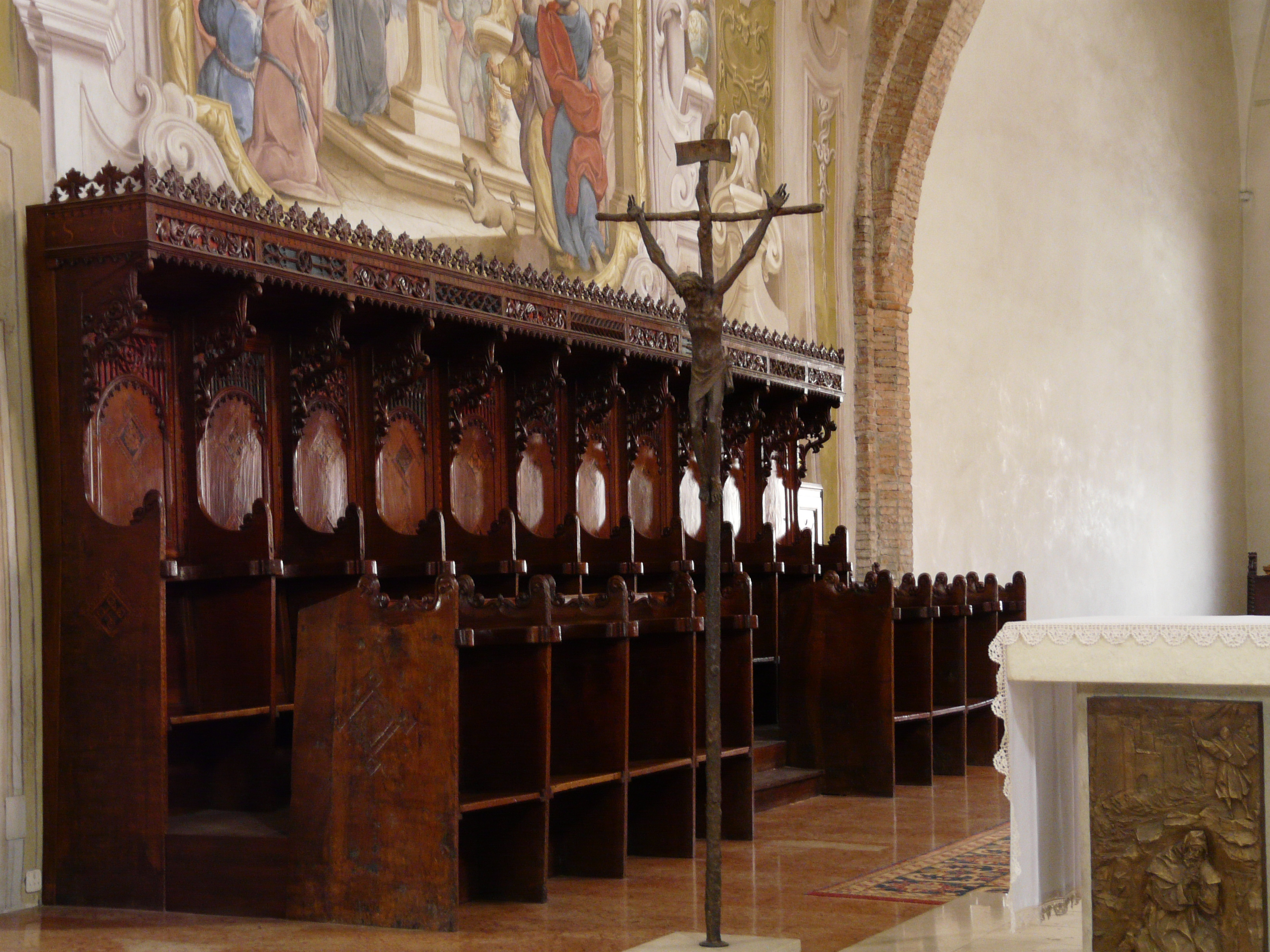 Immagini dell'abbazia di San Colombano di Bobbio, Emilia-Romagna, Italia